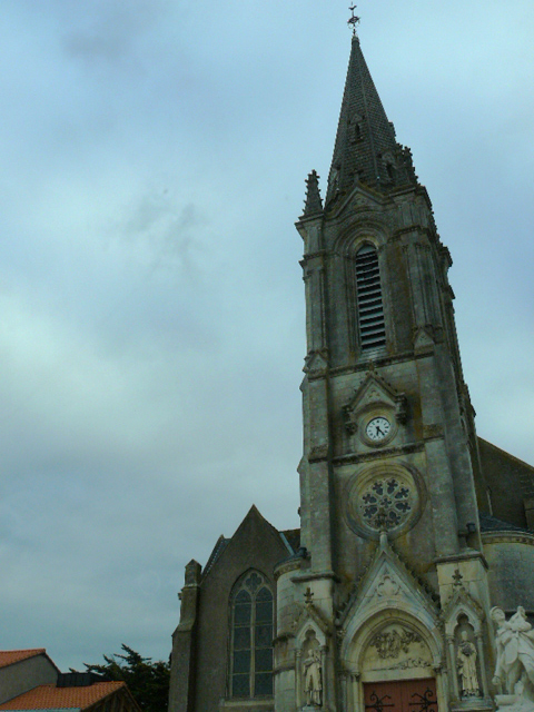 Eglise de La Chevrolière, Loire-Atlantique, France